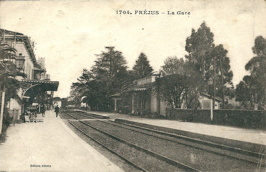 Fréjus (Var) - La gare - début du XXe siècle